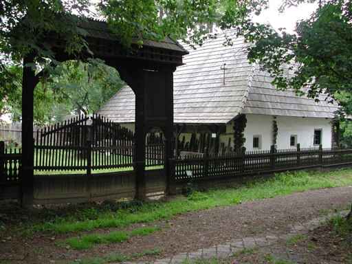 Traditionell "Székelygrind". Eget foto.